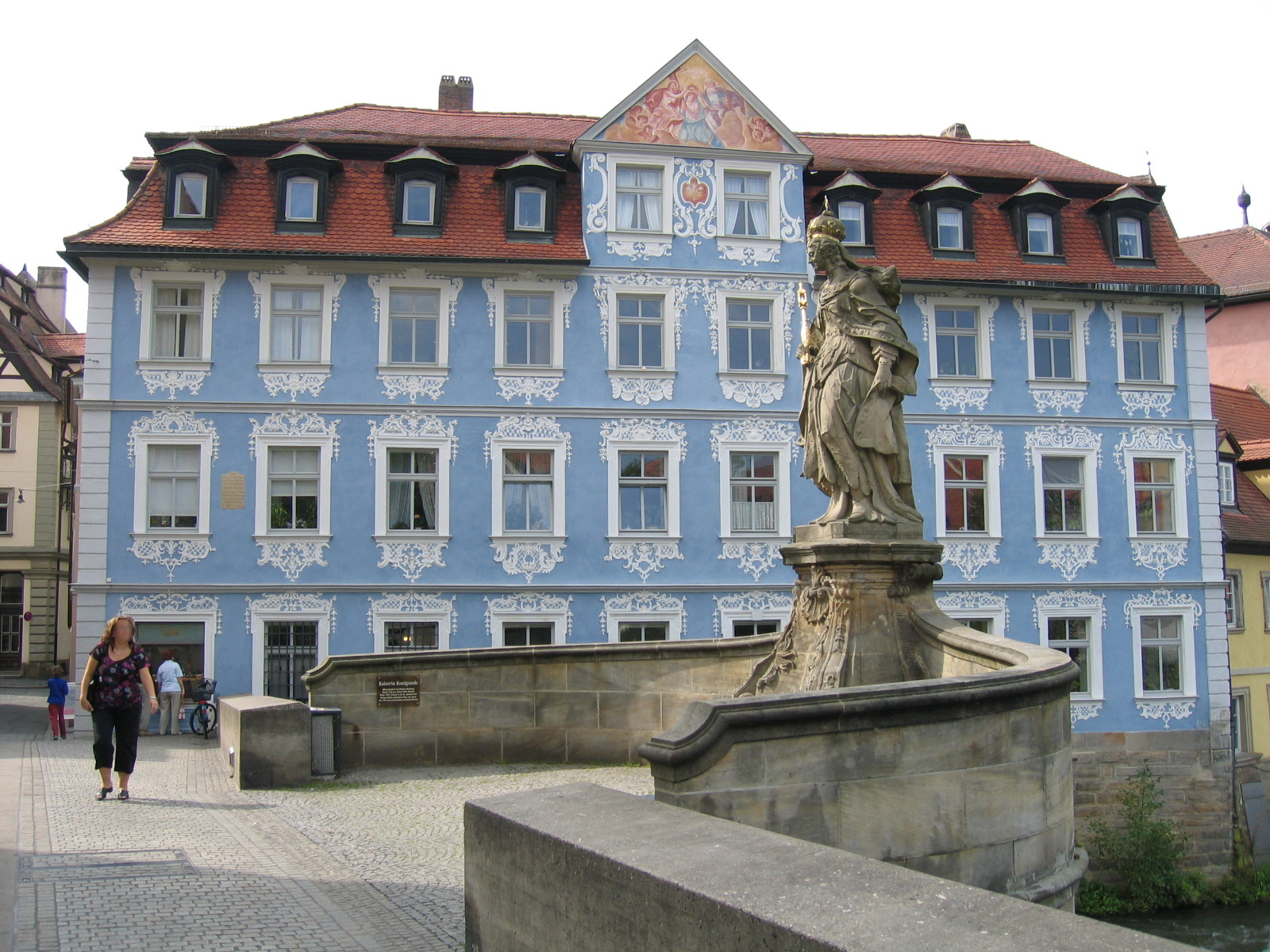 Statue Kaiserin Kunigunde auf der unteren Brücke am Alten Rathaus in Bamberg (Germany), im Hintergrund das „Hellerhaus“ Untere Brücke 2